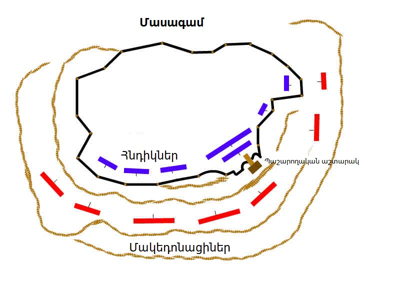 Մասագամի պաշարում սխեմա